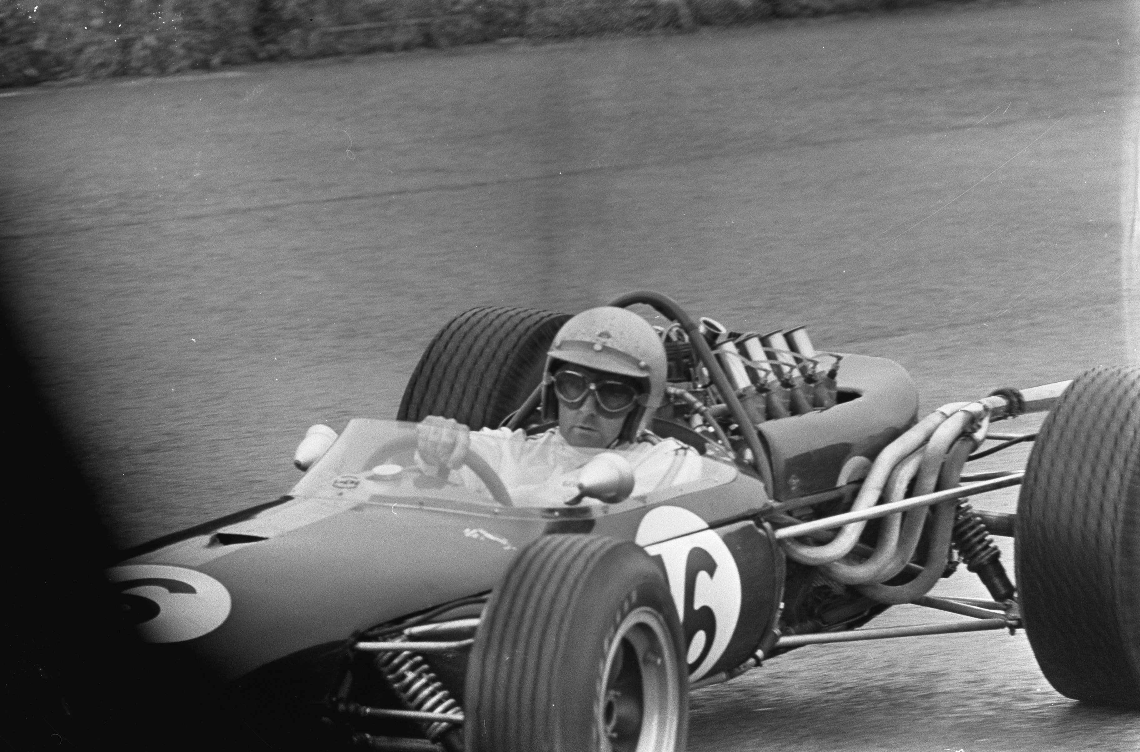 Collectie / Archief : Fotocollectie Anefo Reportage / Serie : [ onbekend ] Beschrijving : Grand Prix Zandvoort , training, Jack Brabham in zijn Pepco Brabham Datum : 22 juli 1966 Persoonsnaam : Jack Brabham Fotograaf : Koch, Eric / Anefo Auteursrechthebbende : Nationaal Archief Materiaalsoort : Negatief (zwart/wit) Nummer archiefinventaris : bekijk toegang 2.24.01.05 Bestanddeelnummer : 919-3823